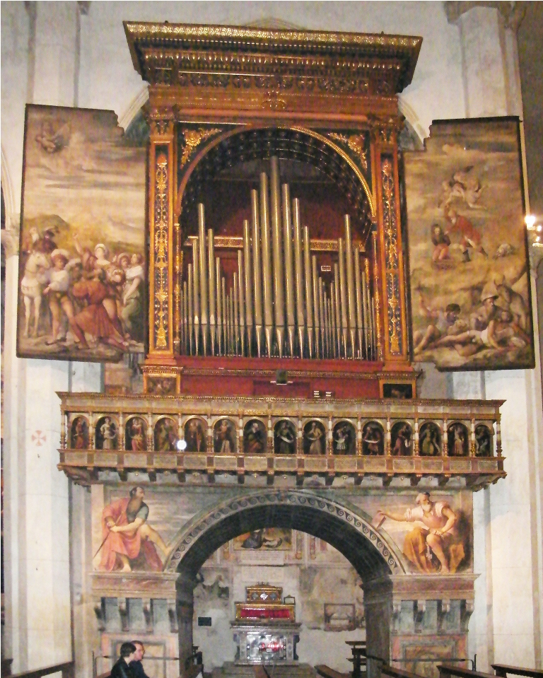 Organo (Antegnati) - Ante (Romanino) - Chiesa S. Andrea - Asola This illustration was made by Luca Giarelli Use this work, but please always credit author's name in the immediate vicinity of the image. Example: Luca Giarelli / CC-BY-SA 3.0 A special thanks to... Questa immagine è opera di Luca Giarelli Usa quest'opera, ma ricordati di citare sempre l'autore nelle immediate vicinanze dell'immagine. Esempio: Luca Giarelli / CC-BY-SA 3.0 Un ringraziamento particolare a...